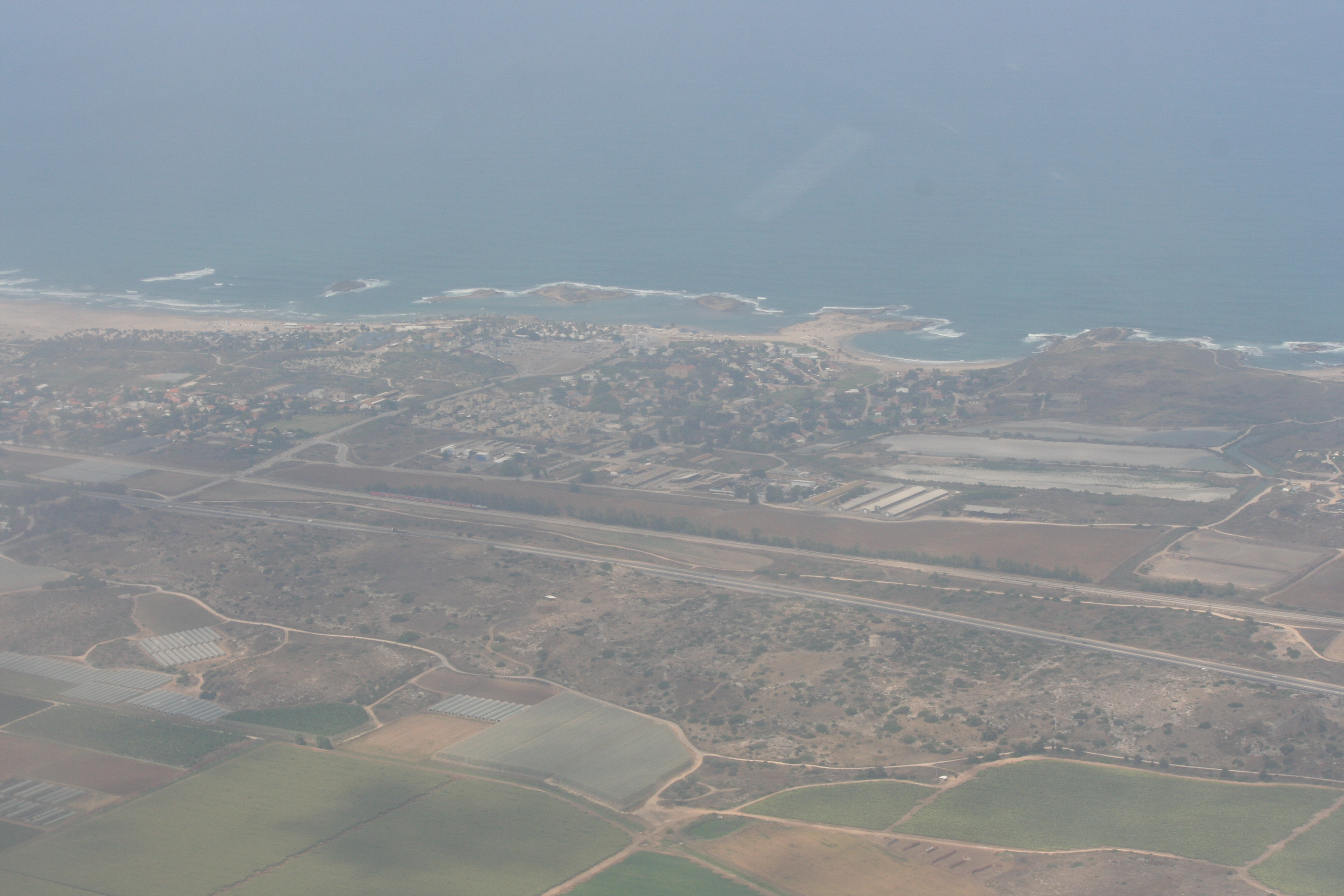 נחשולים ודור